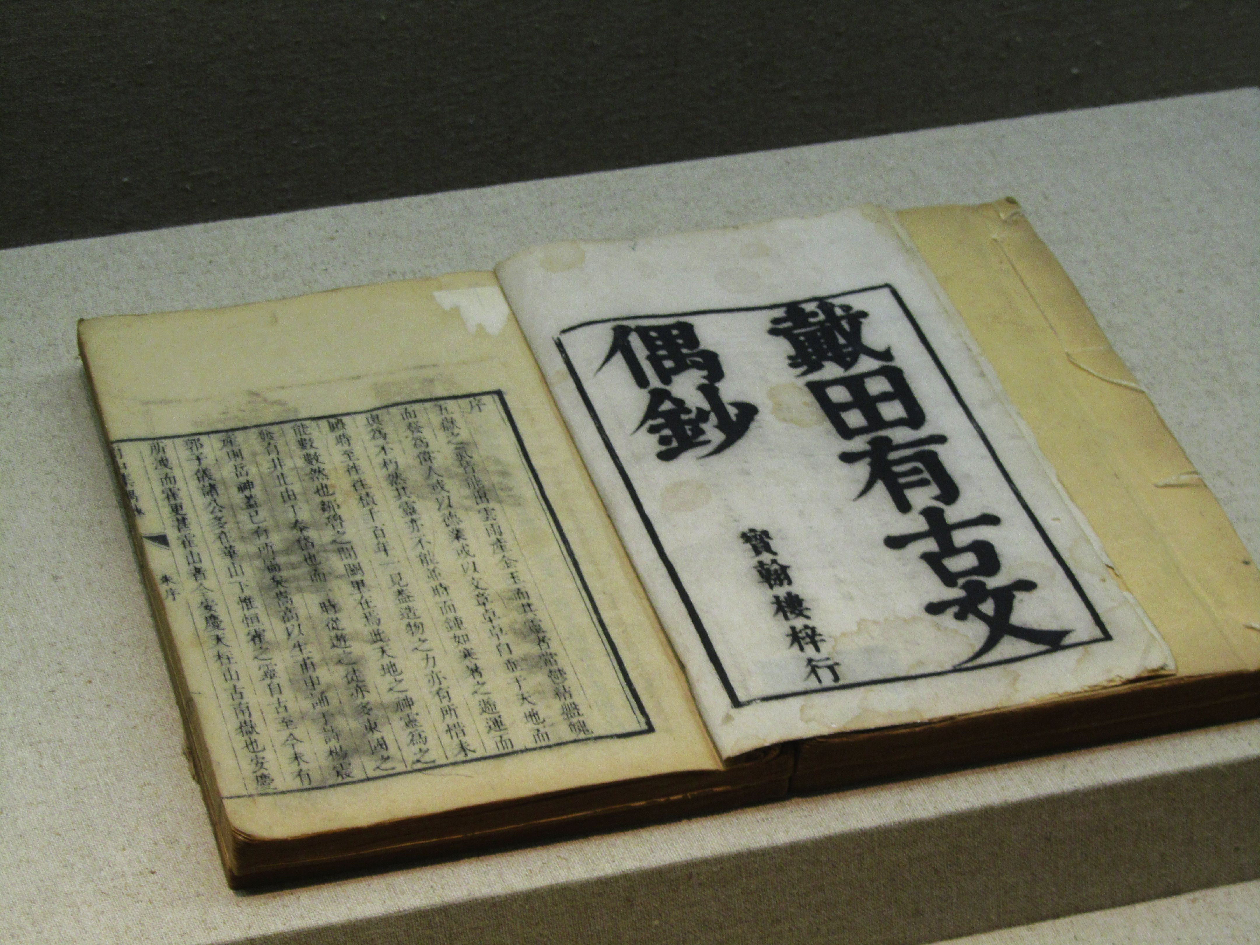 清代戴名世《南山集偶抄》，藏于安徽博物院。